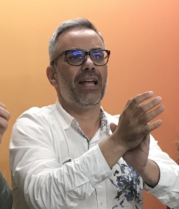 Nit electoral per les eleccions generals espanyoles de 2019 a la seu d'ERC a Girona